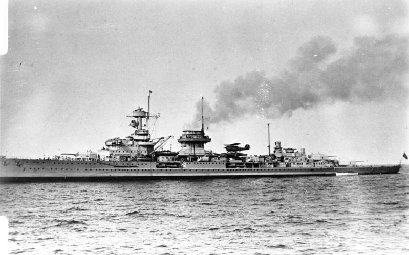 Leichter Kreuzer "Nürnberg" Leichter Kreuzer "Nürnberg" auf See. Ansicht der Backbordseite